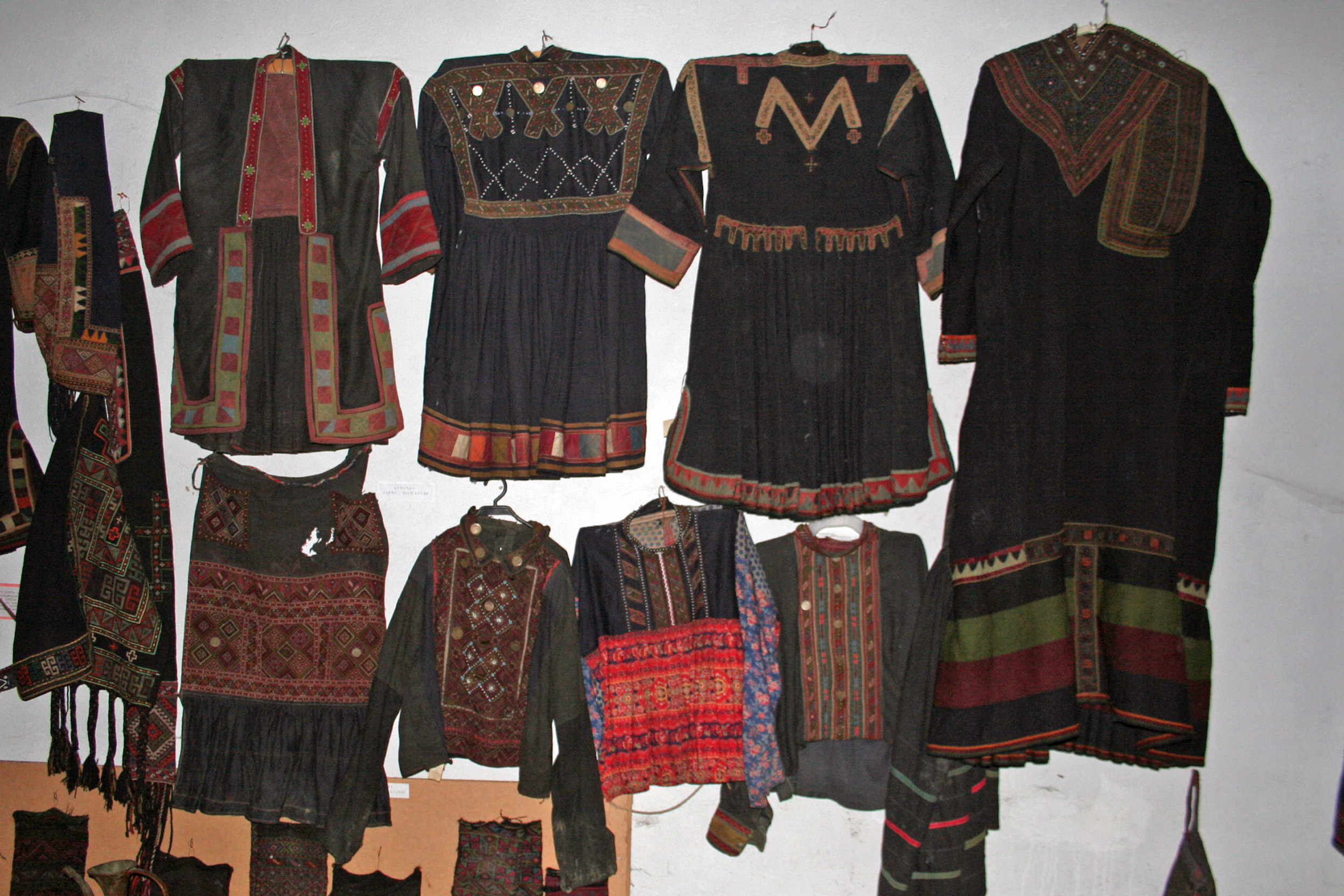 Georgische Trachten